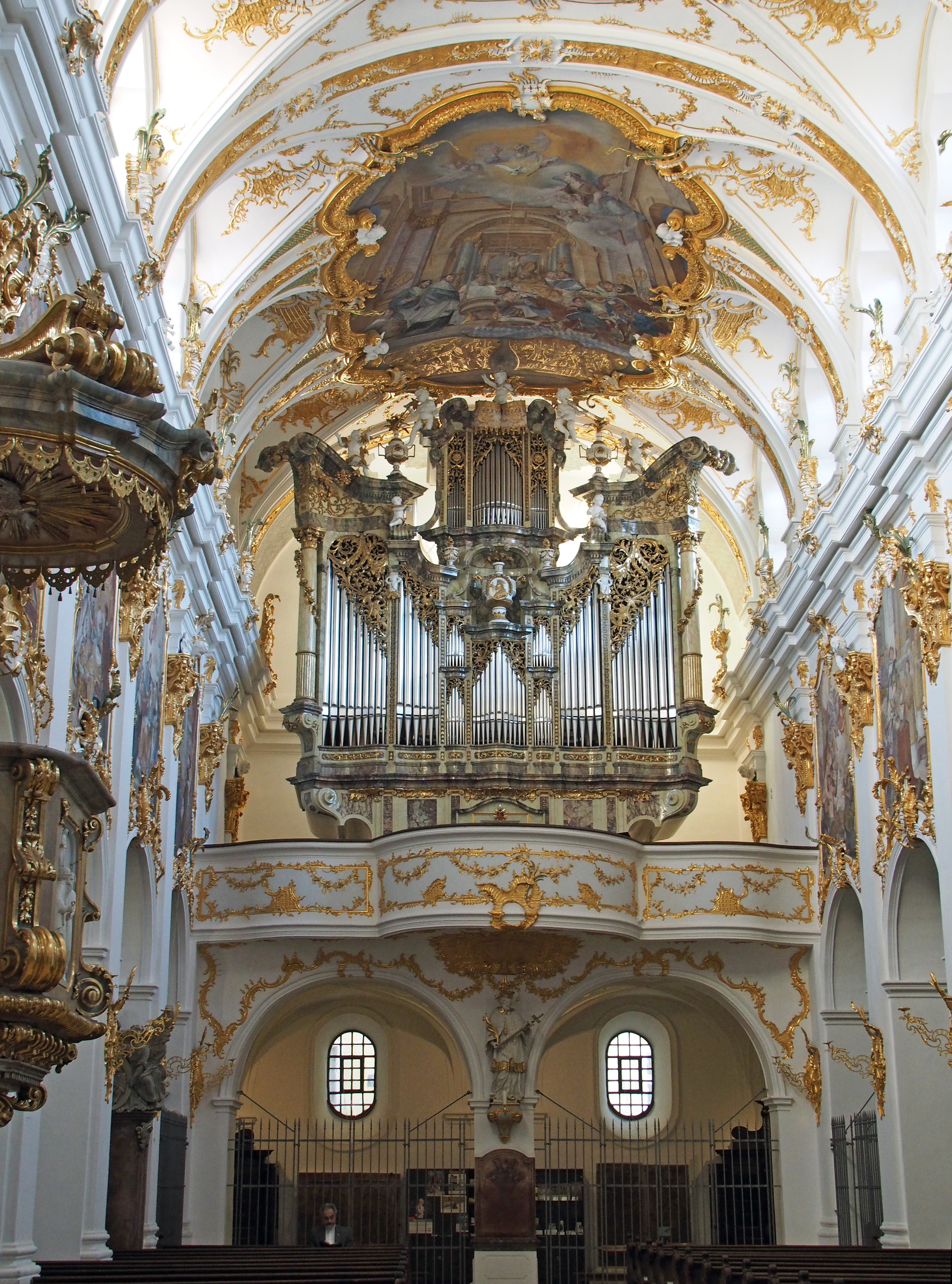 Orgel und Empore in der „Alten Kapelle“ Regensburg